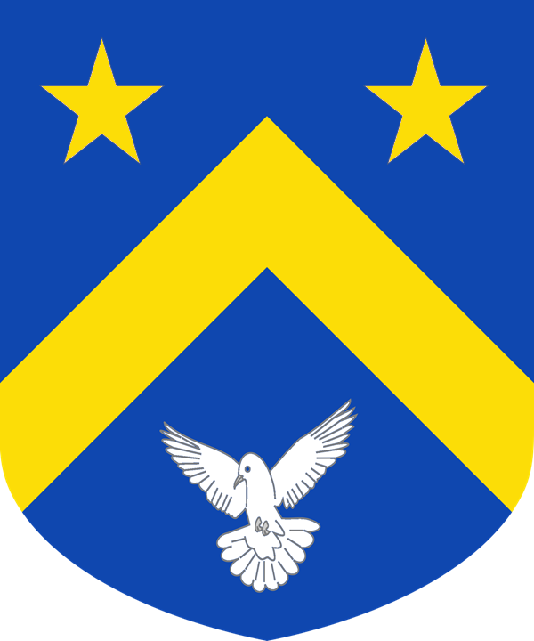 shield of de Gautier de Senez